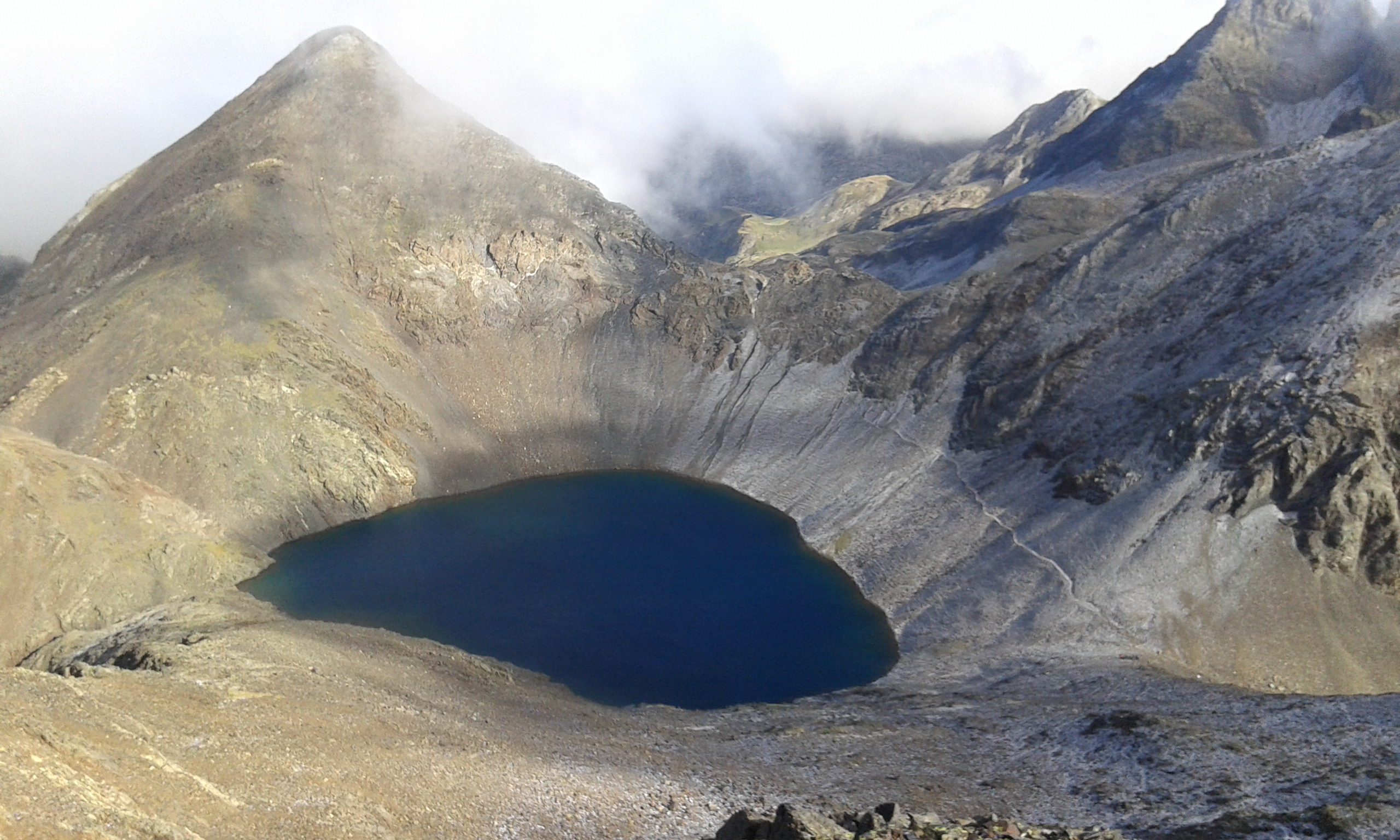 Ibón de Tebarrai